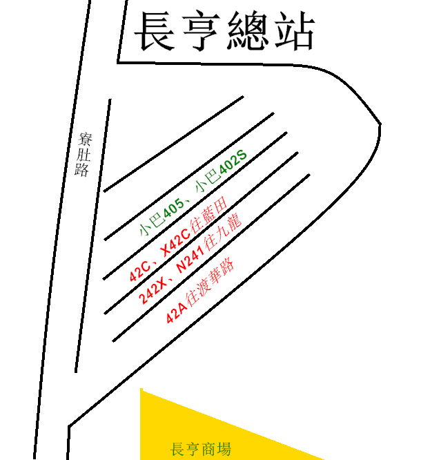 中文（香港）: 長亨巴士總站的平面圖